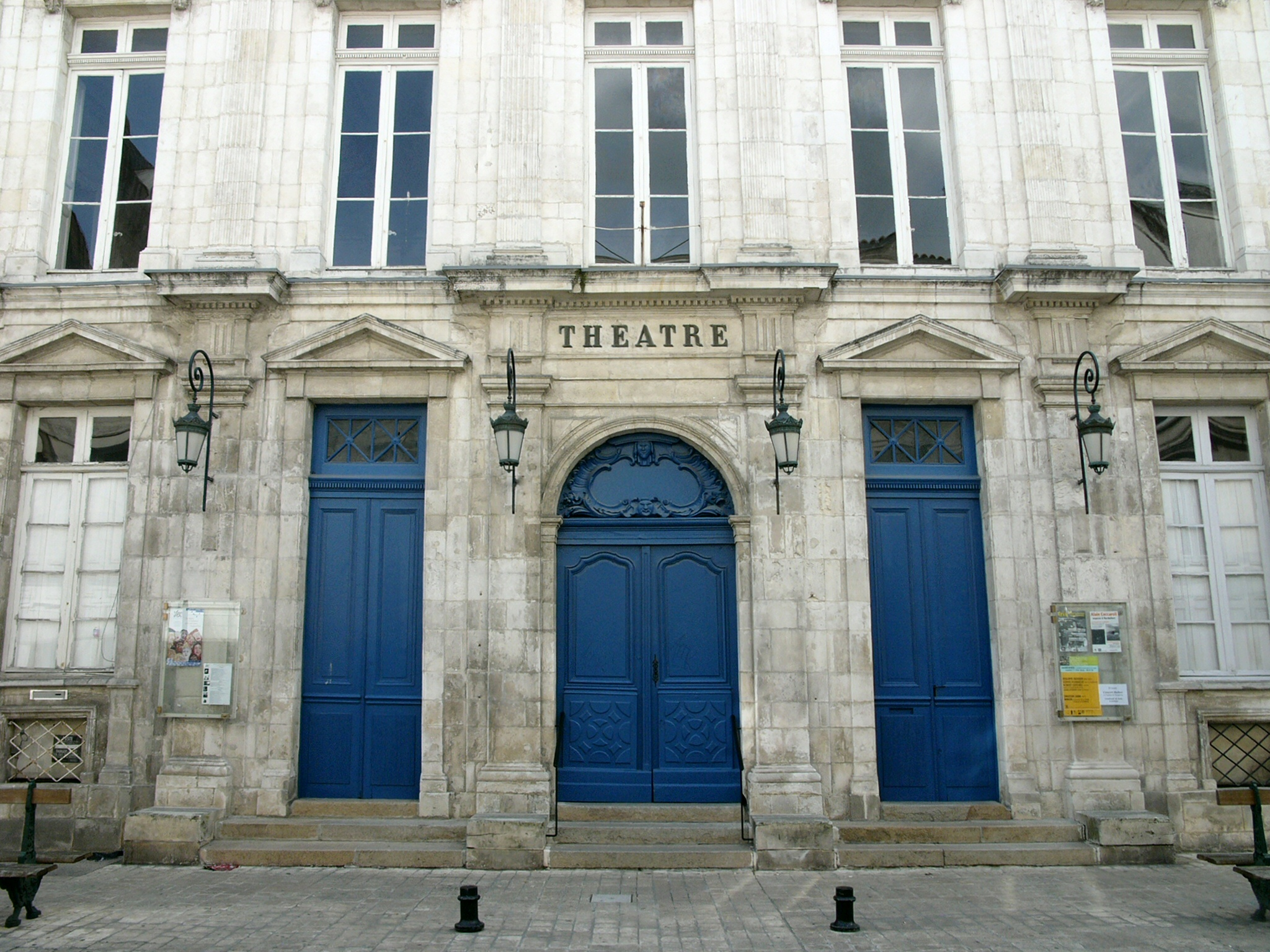 Façade du Théatre Rochefort Charente Maritime France